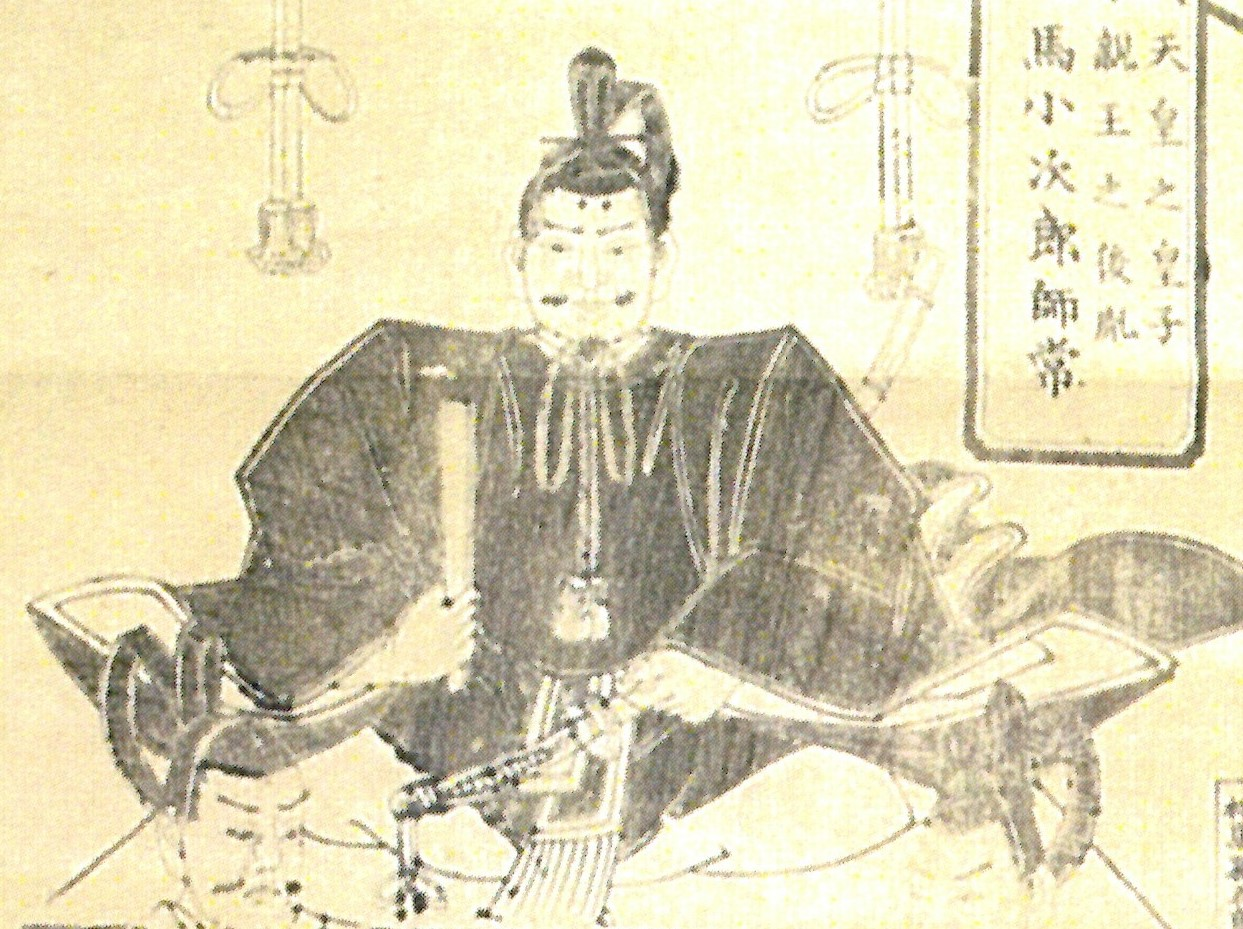 相馬師常の画像(「相馬家歴代藩主像」より)。